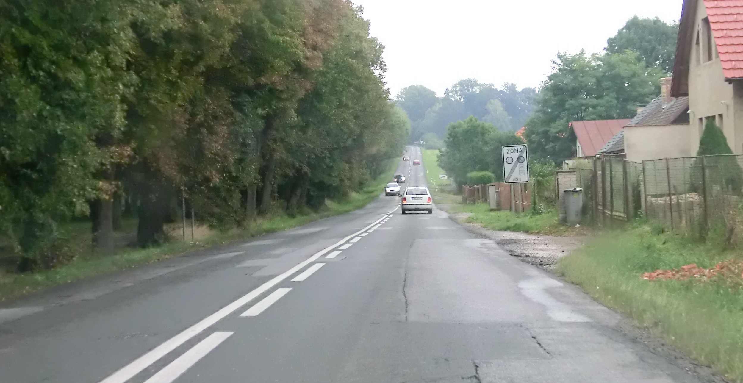 Silnice z Jičína do Lomnice n.Pop. - vlevo lipová Valdštejnova alej